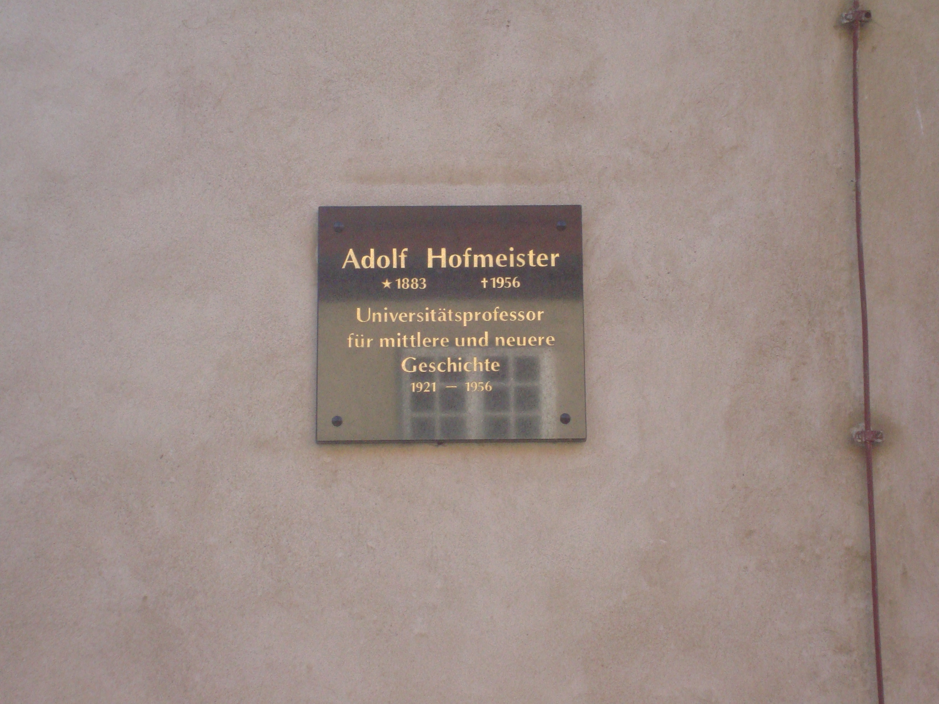 Gedenktafel für Adolf Hofmeister in der Domstraße 9a in Greifswald.